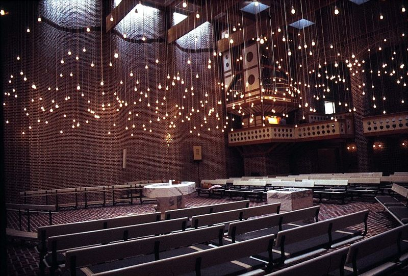 Sædden Kirke i Danmark. Kirkerummet set mod sydøst